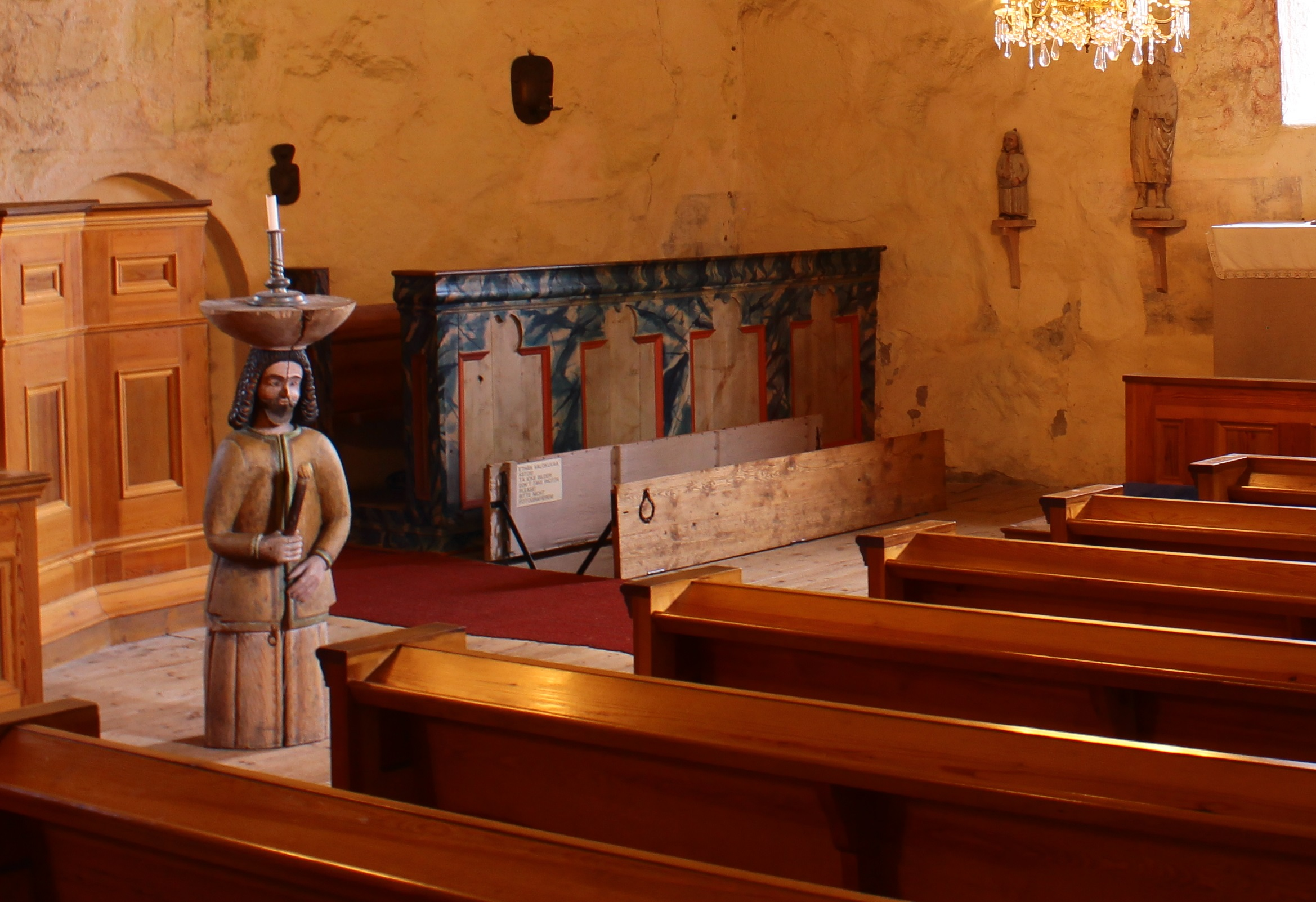 Rungiuksen hauta Keminmaan vanhassa kirkossa.